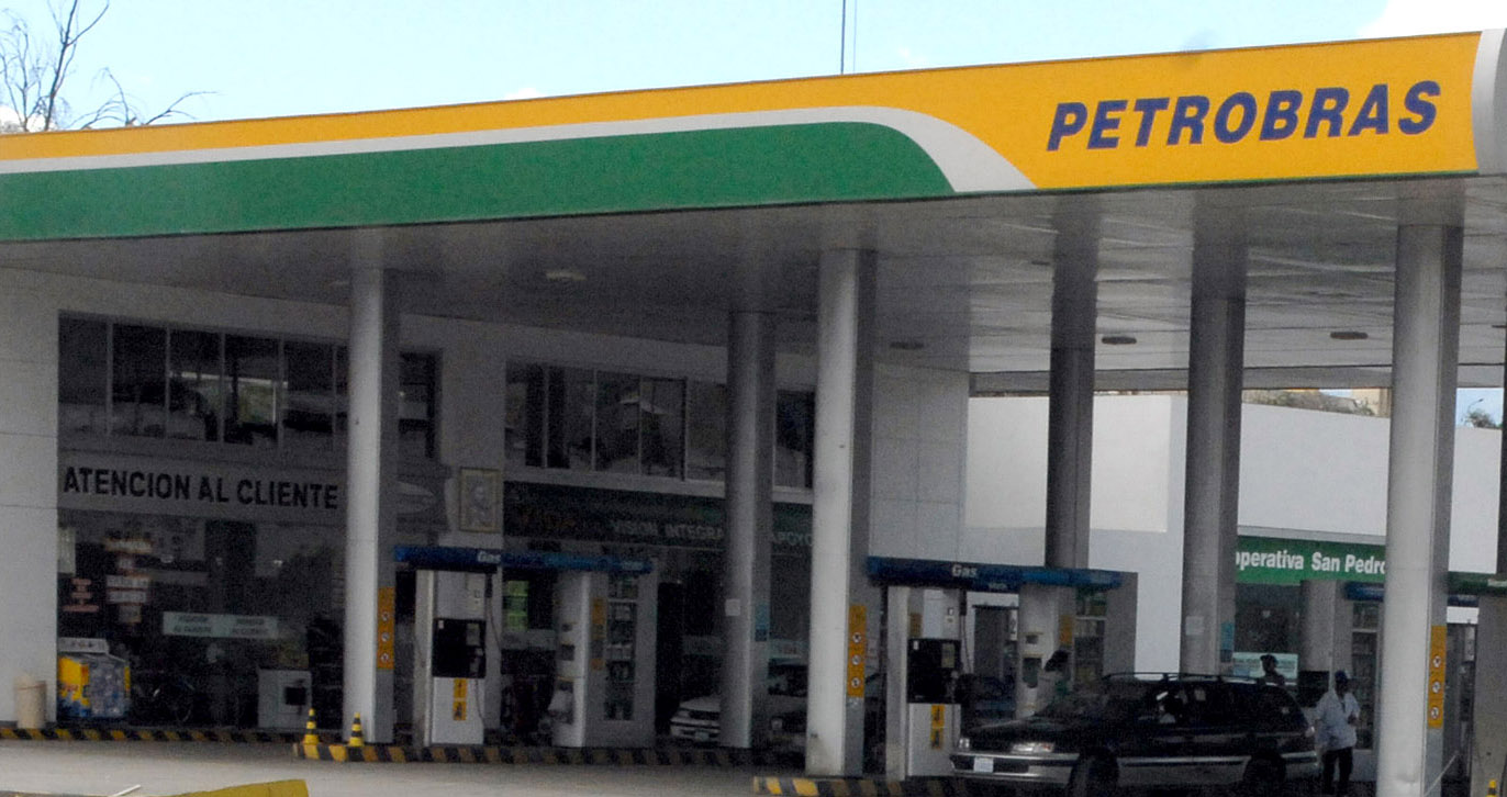 Cochabamba (Bolívia) - Postos de venda de combustível da estatal brasileira Petrobras nas ruas de Cochabamba, cidade na região central da Bolívia